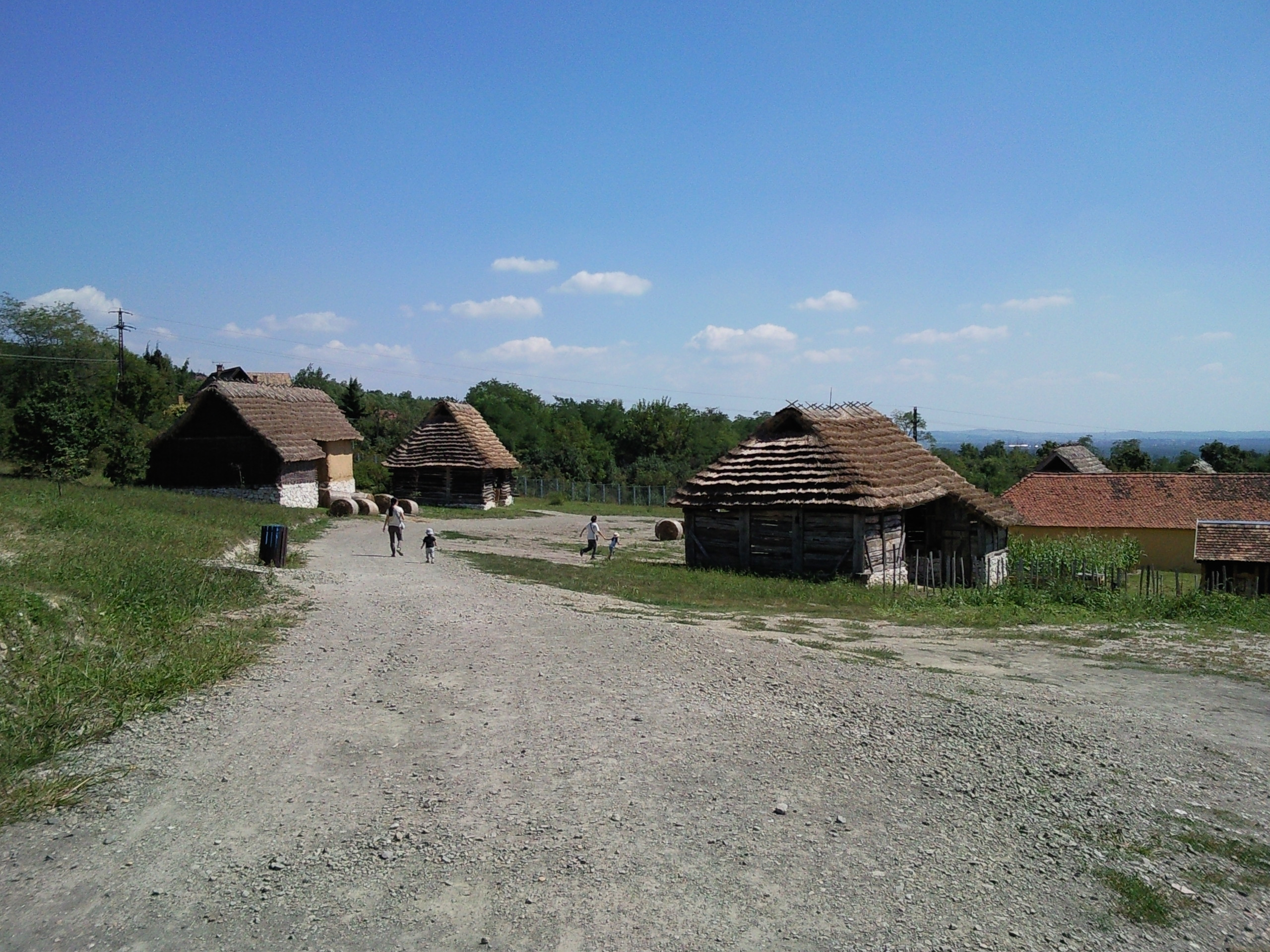 Szentendre, Hungary